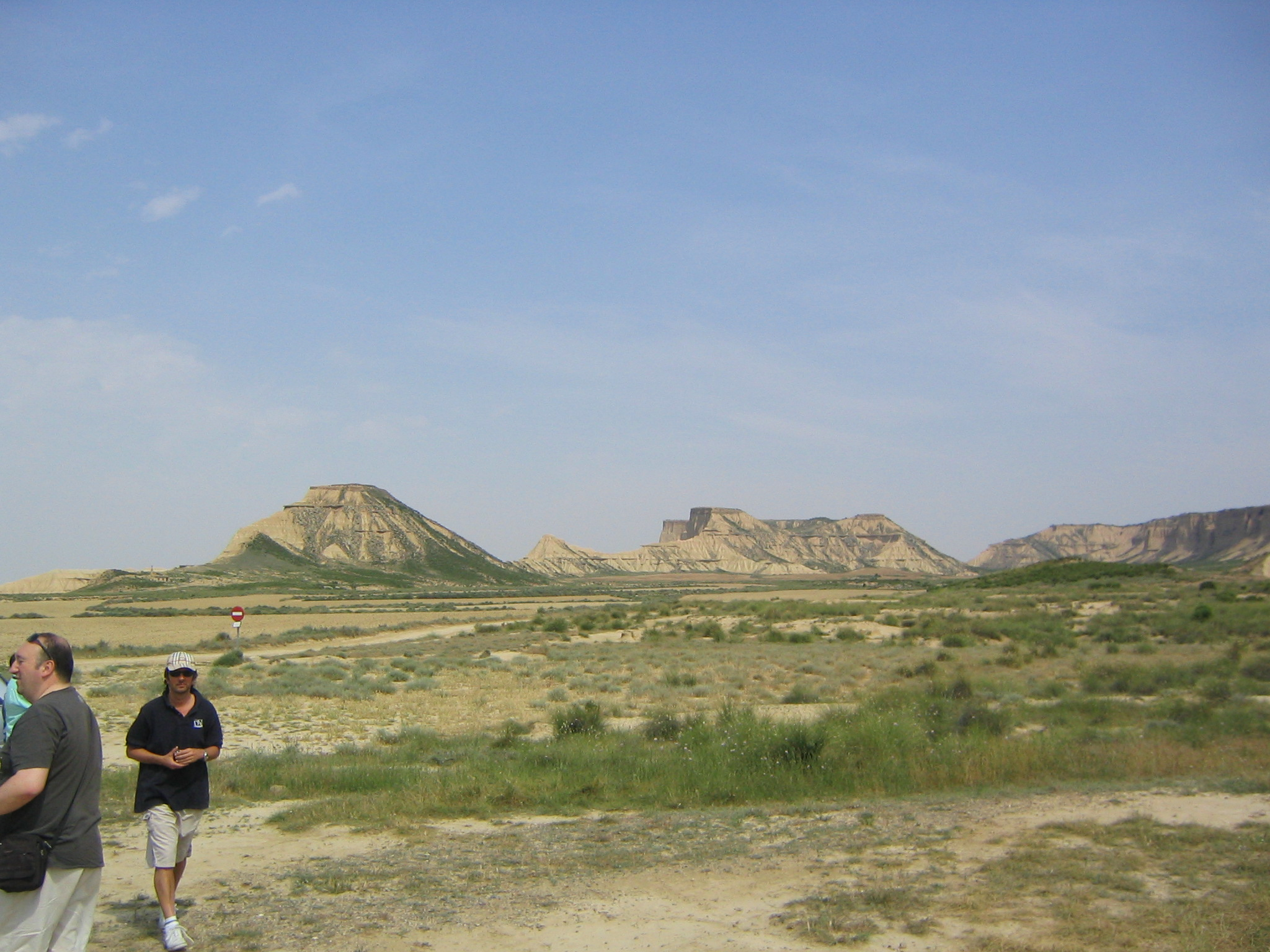 Paisaje de las Bardenas Reales de Navarra, con los cabezos de Sanchicorrota, el Rallón y la Ralla.